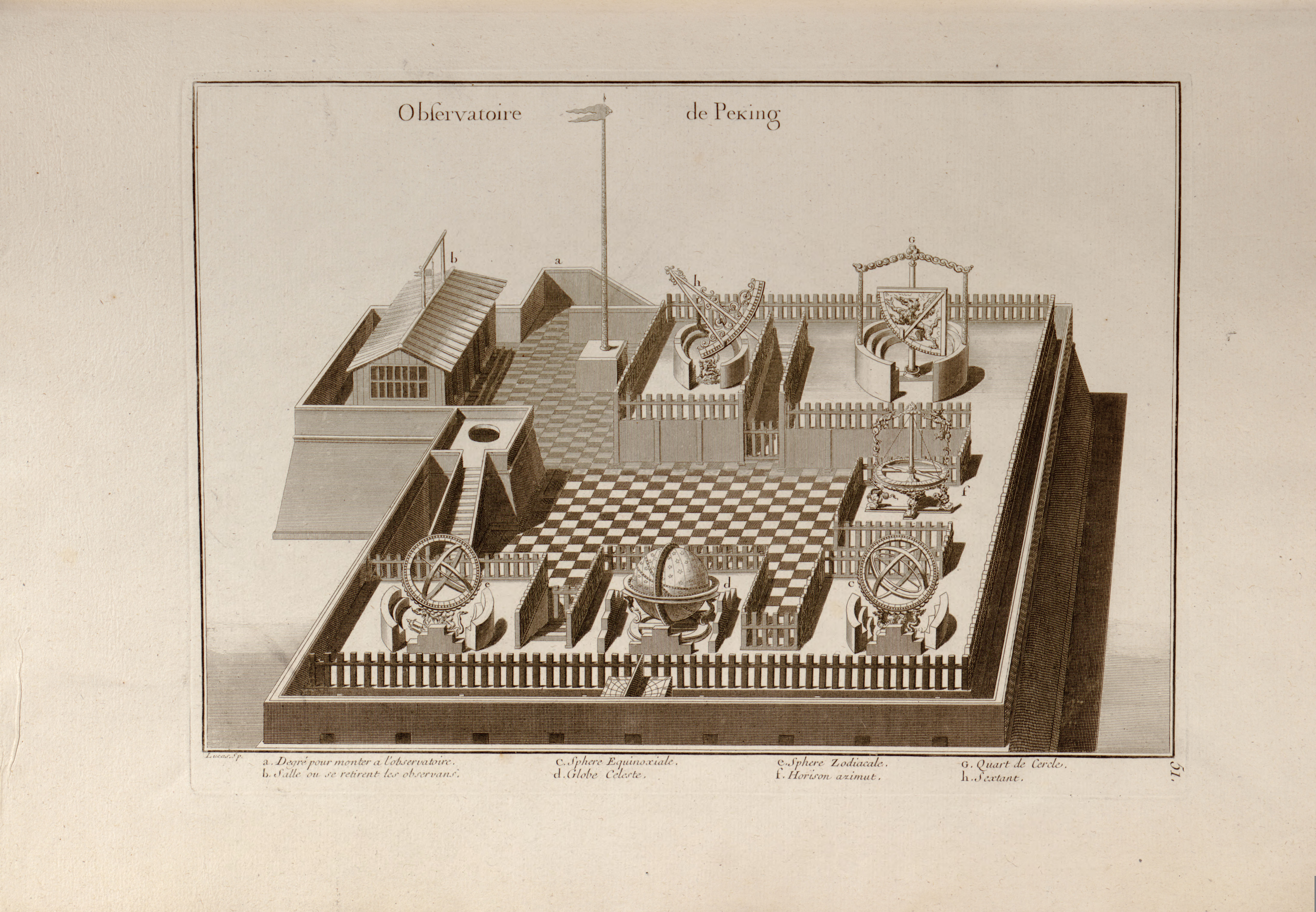 Atlas général de la Chine, de la Tartarie chinoise, et du Tibet : pour servir aux différentes descriptions et histoires de cet empire / par M. d'Anville, premier géographe du roi. Rev. ed. of: Nouvel atlas de la Chine, de la Tartarie chinoise et du Thibet. 1737. C'est une copie en miroir d'un dessin du père Louis Le Comte (« Peut-être que votre altesse sera bien aise d'en voir tout d'un coup la disposition dans une figure. Le dessin que j'en ai fait… »), publié en 1696 dans le tome I de ses Nouveaux mémoires sur l'état présent de la Chine.